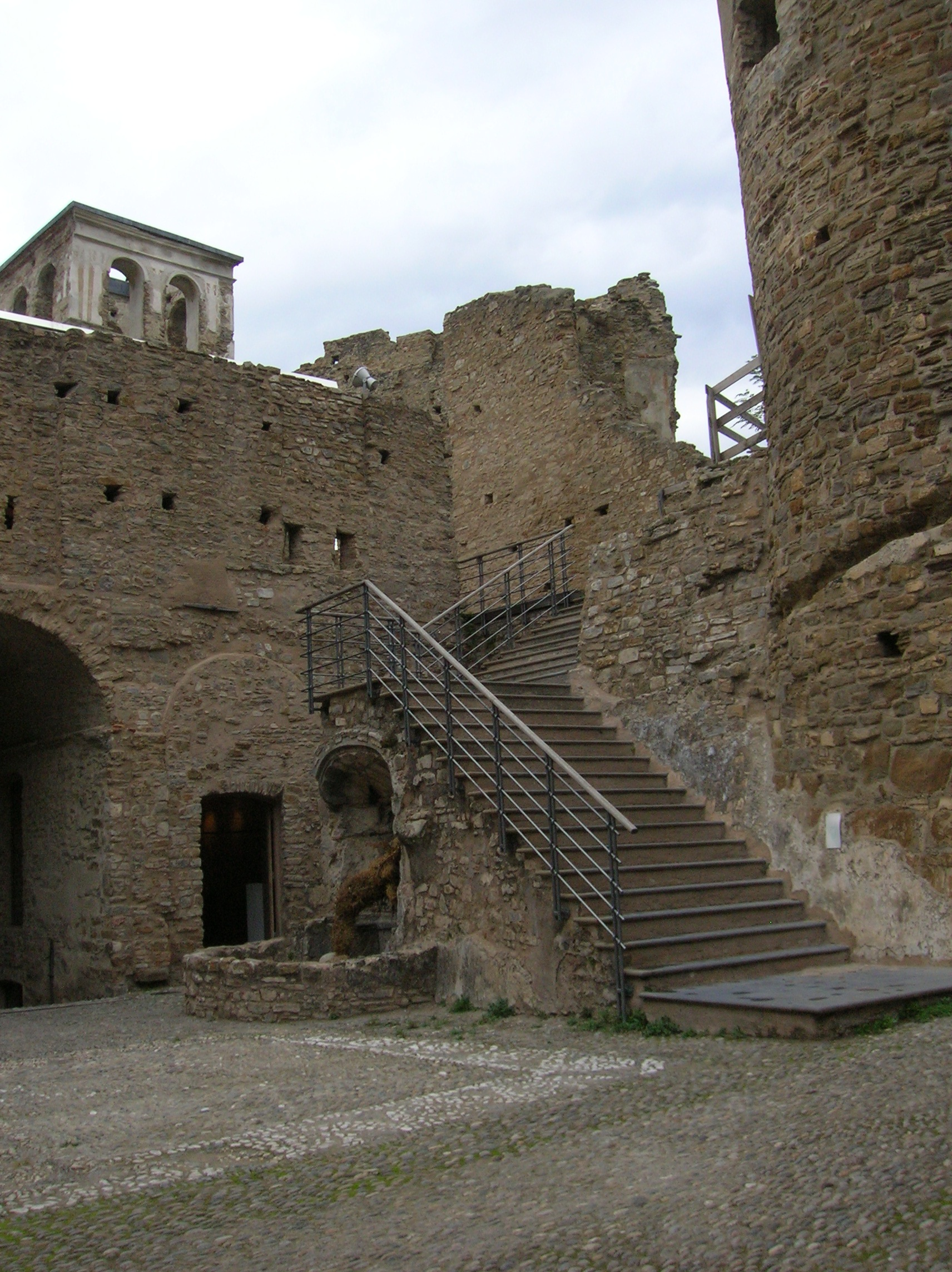 Castello di Dolceacqua, Liguria, Italia.